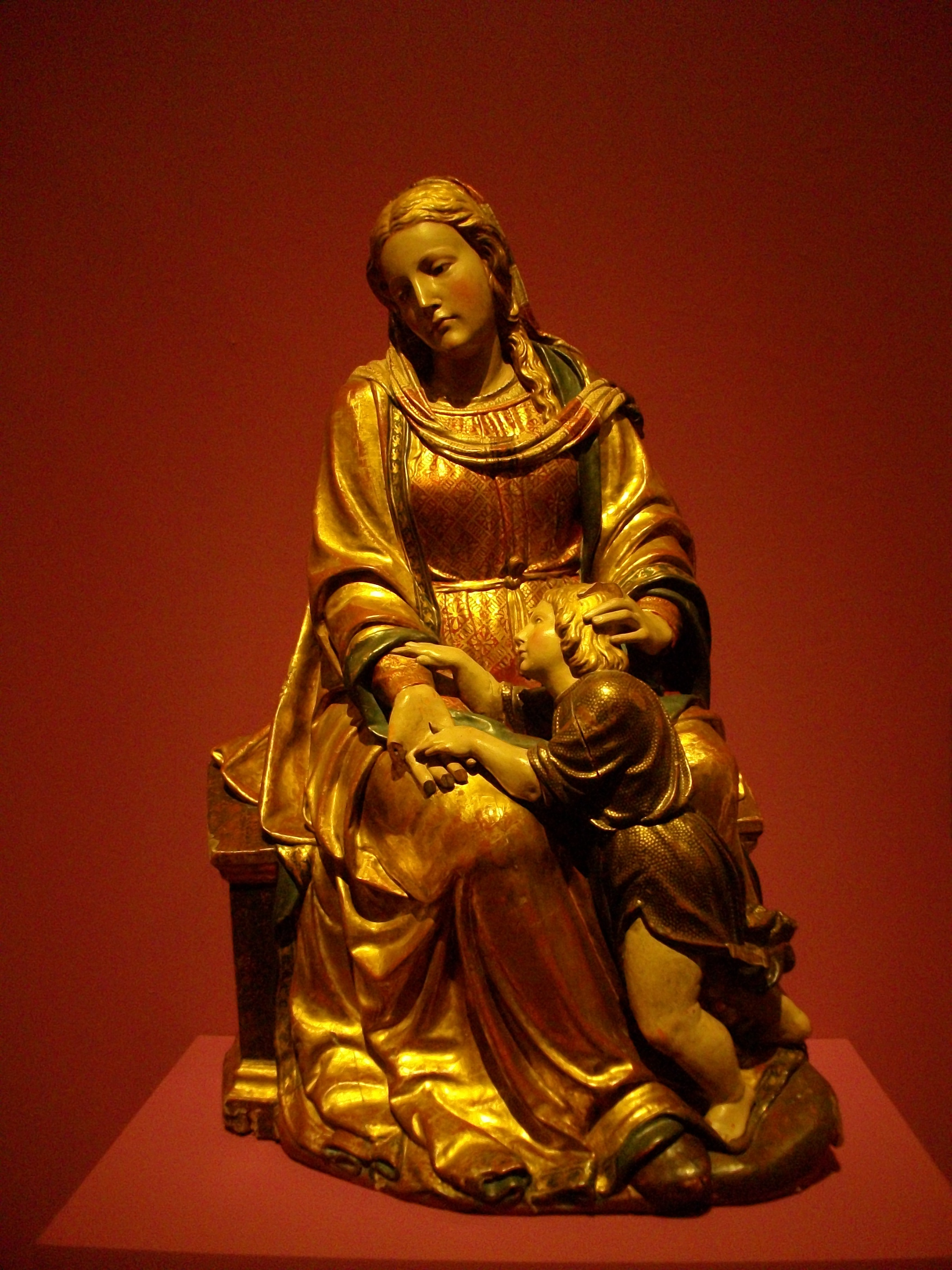 Gabriel Yoly, Virgen con el Niño (1527). Madera dorada y policromada, 118x 75 cm, procedente de la Iglesia parroquial de San Miguel Arcángel de Villafeliche (Zaragoza)